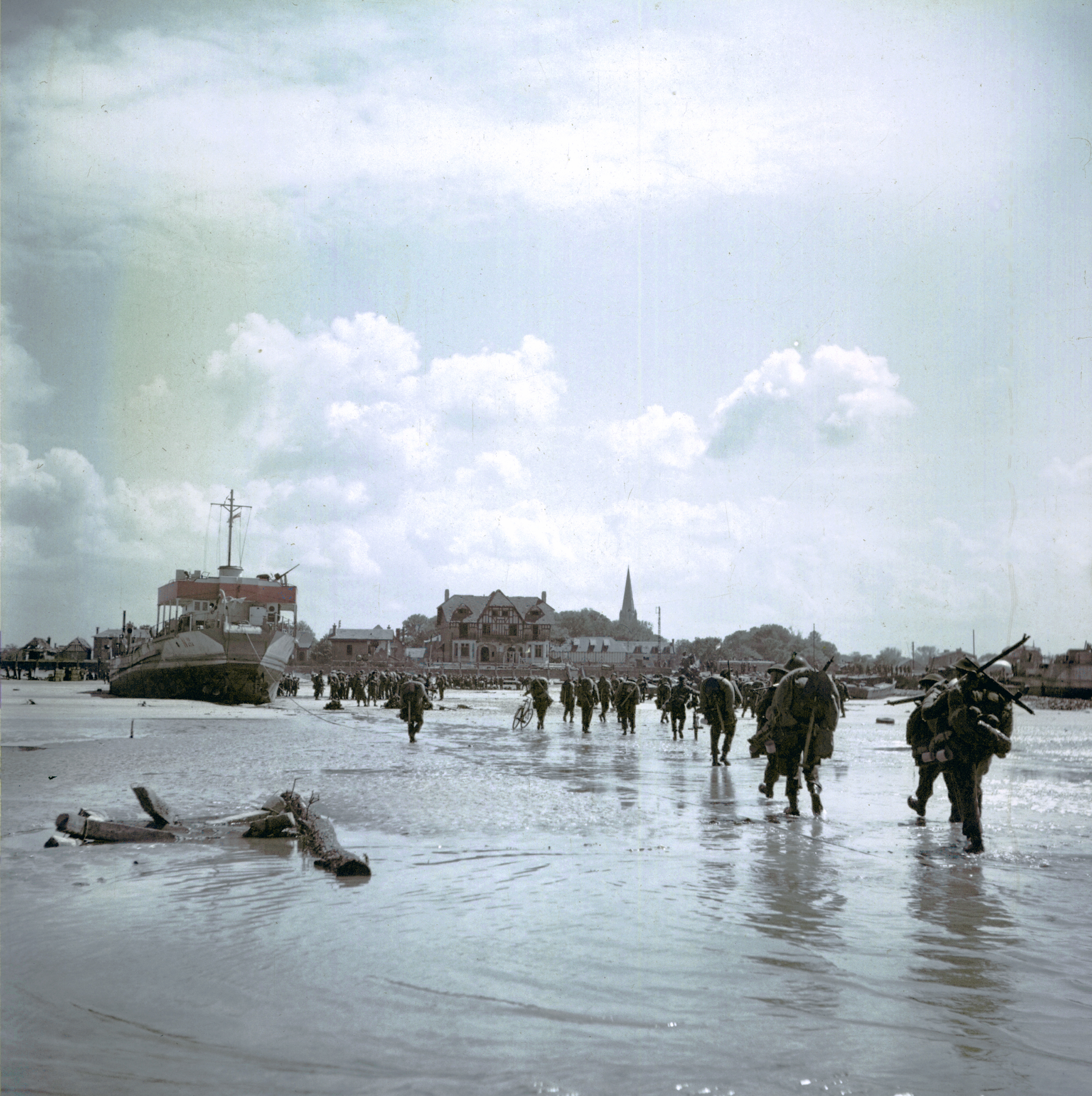 Ces soldats de l'infanterie canadienne débarquent sur la plage de Juno Beach. En arrière-plan, on aperçoit Bernières-sur-Mer. Les soldats canadiens marchent en direction de Bernières-sur-Mer.